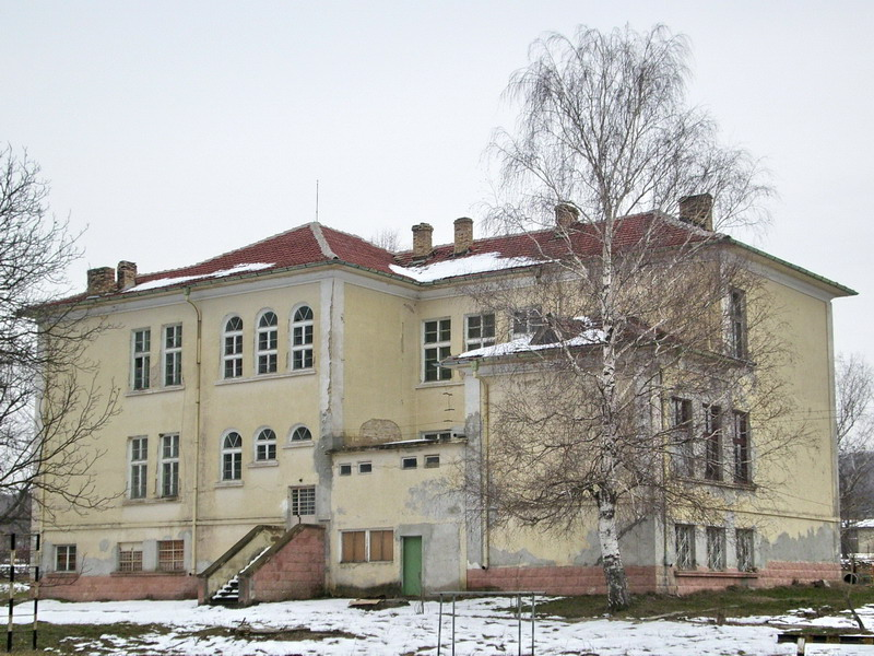 Село Глогинка, община Попово. Сградата на бившето училище и детската градина.